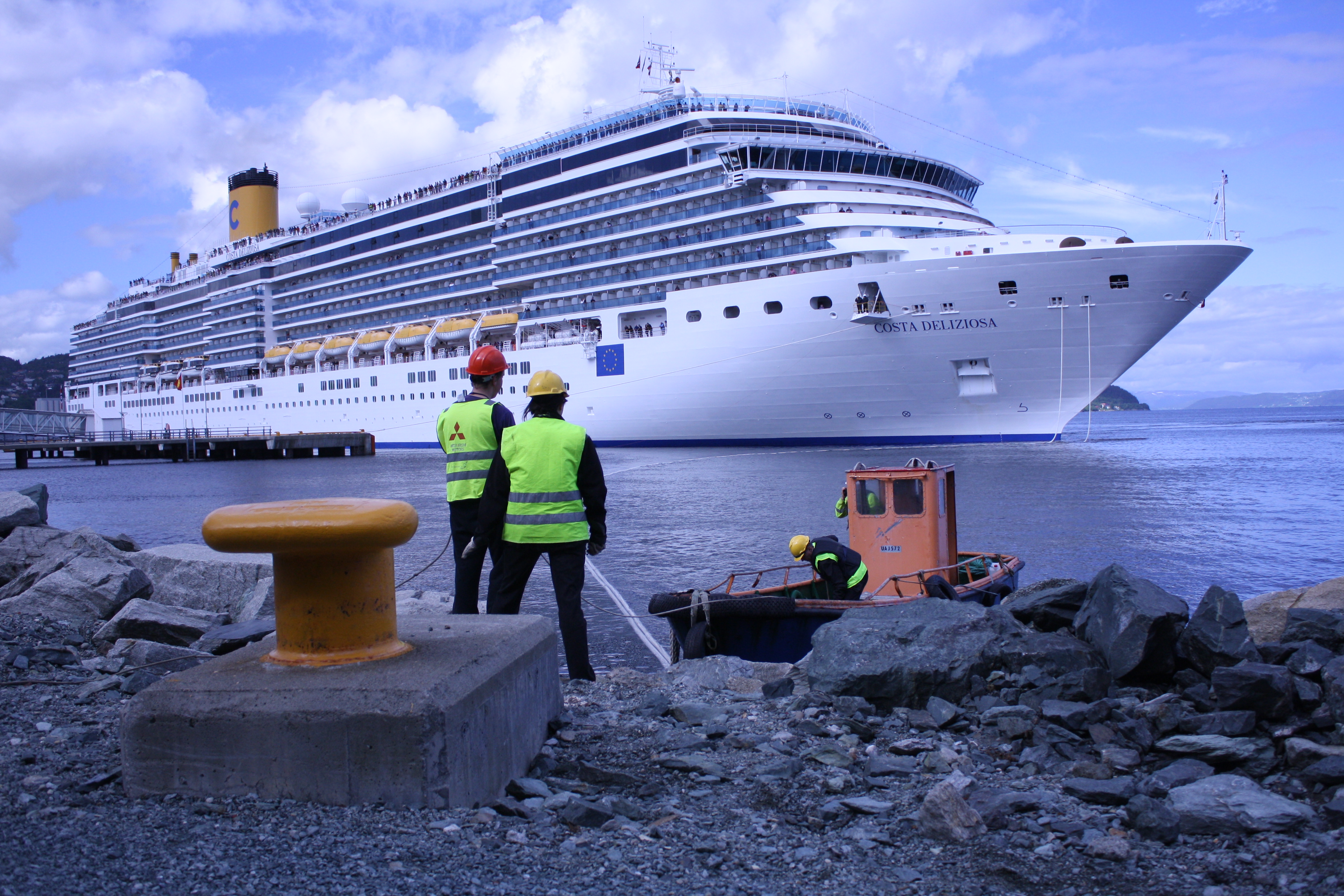 Cruiseskipet fortøyes av mannskap fra Trondheim Boatman.